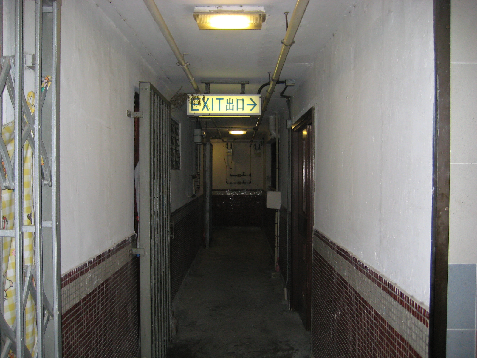 工字型大廈走廊(黃大仙下邨)